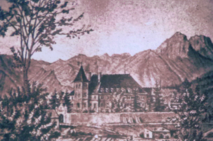 Schloss_Schönleiten